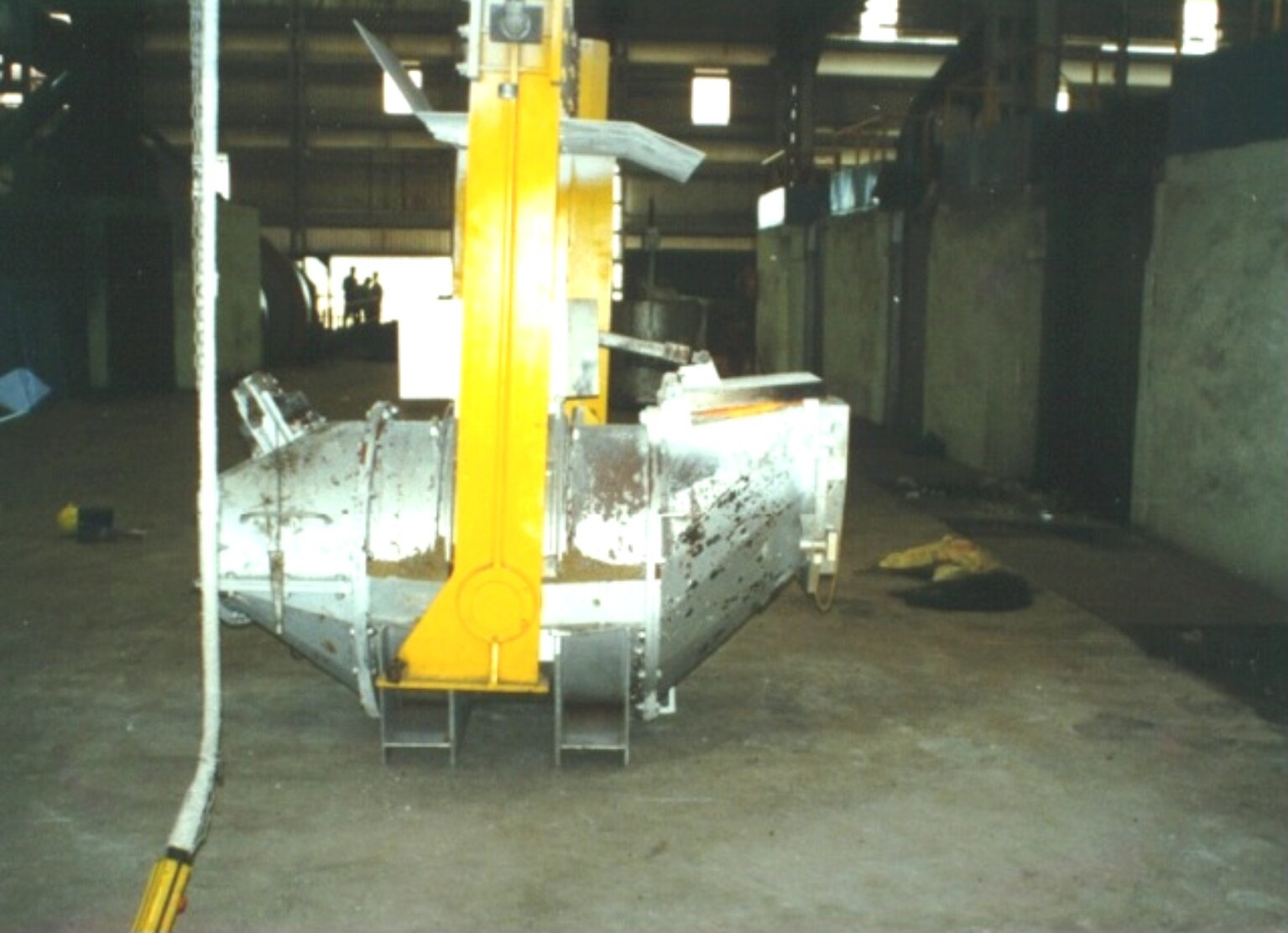 Kompaktní konvertor zavěšený na jeřábovém háku